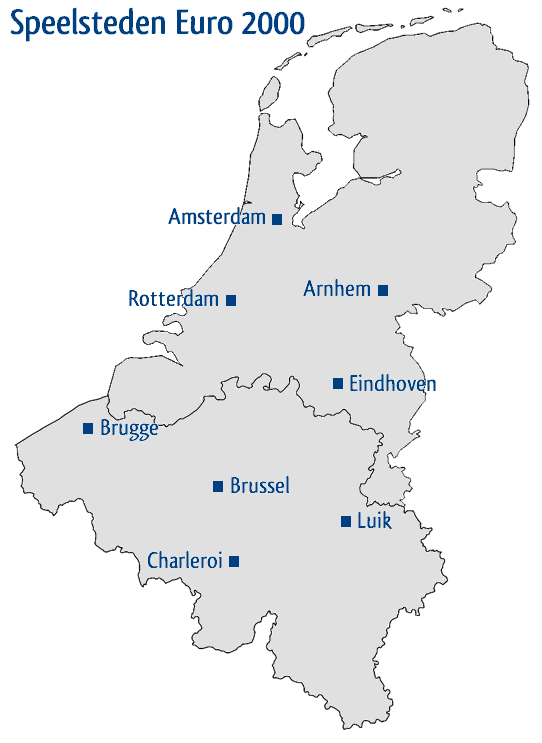 Speelsteden tijdens het EK voetbal 2000 in Nederland en België